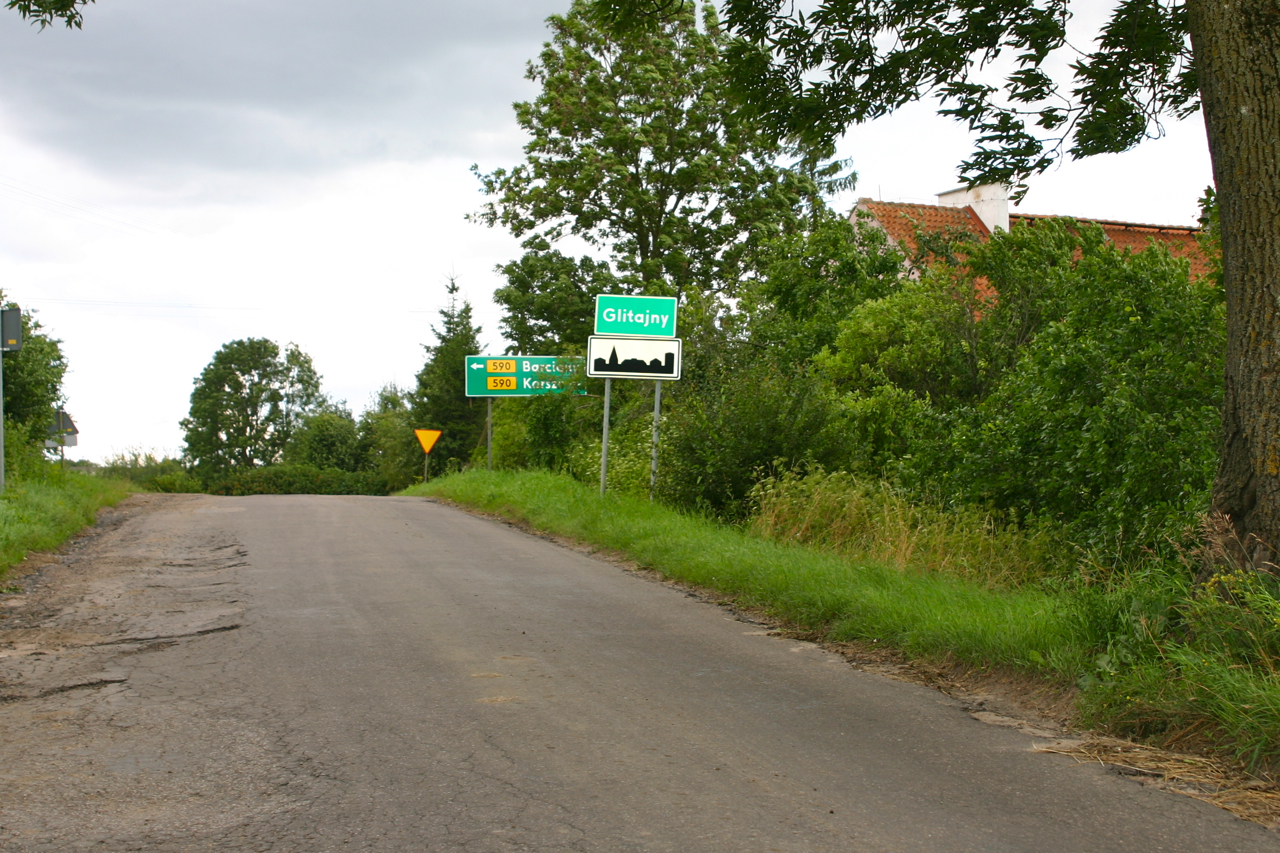 Glitajny